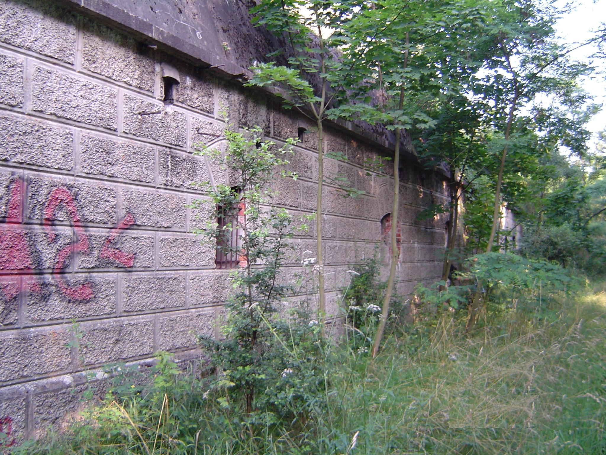 Fort Świerkocin k/Grudziądza